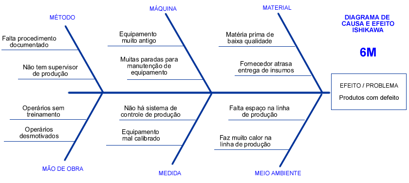 Diagrama de causa e efeito (espinha de peixe) - Ishikawa - 6M